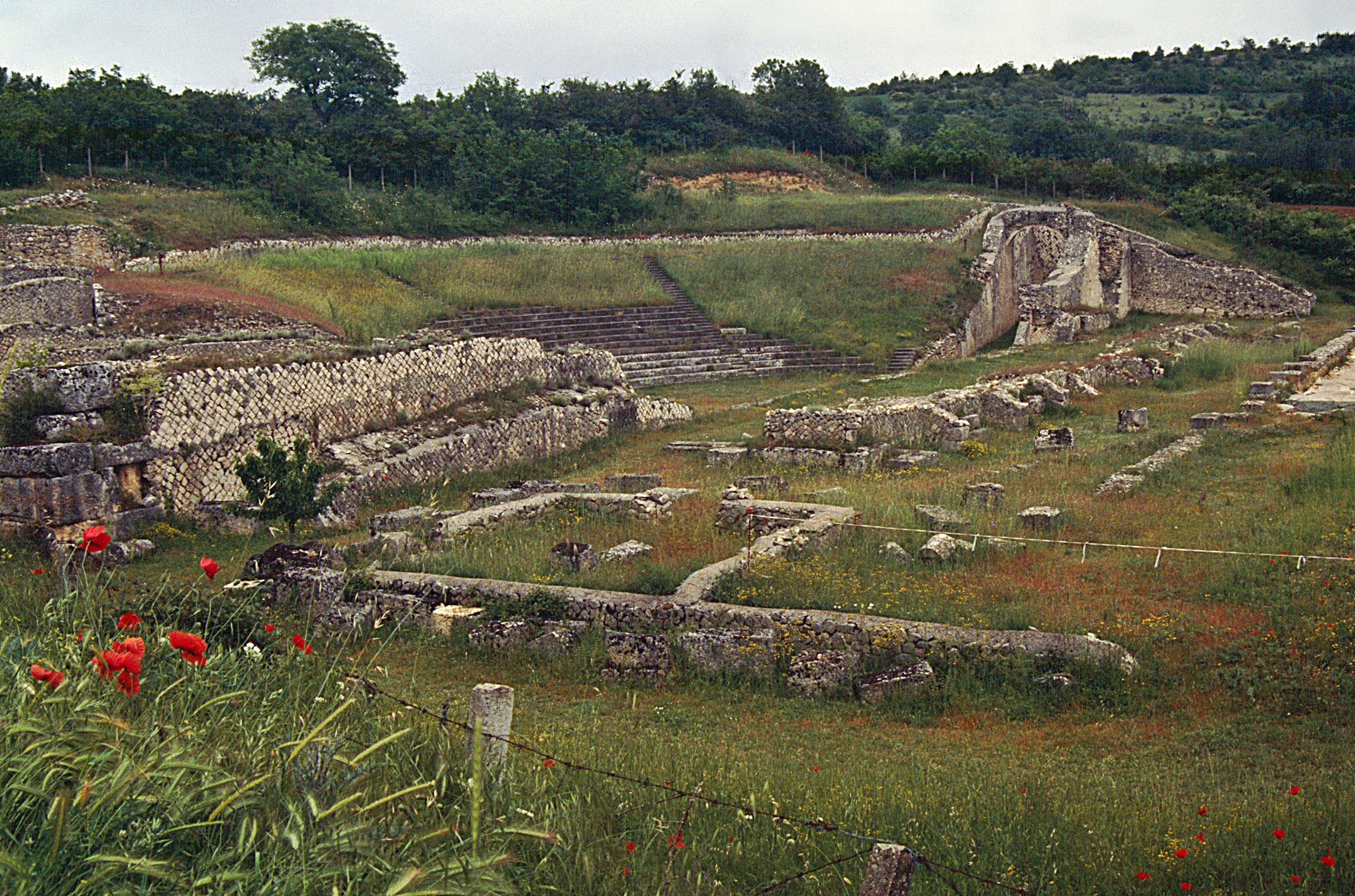 Amiternum